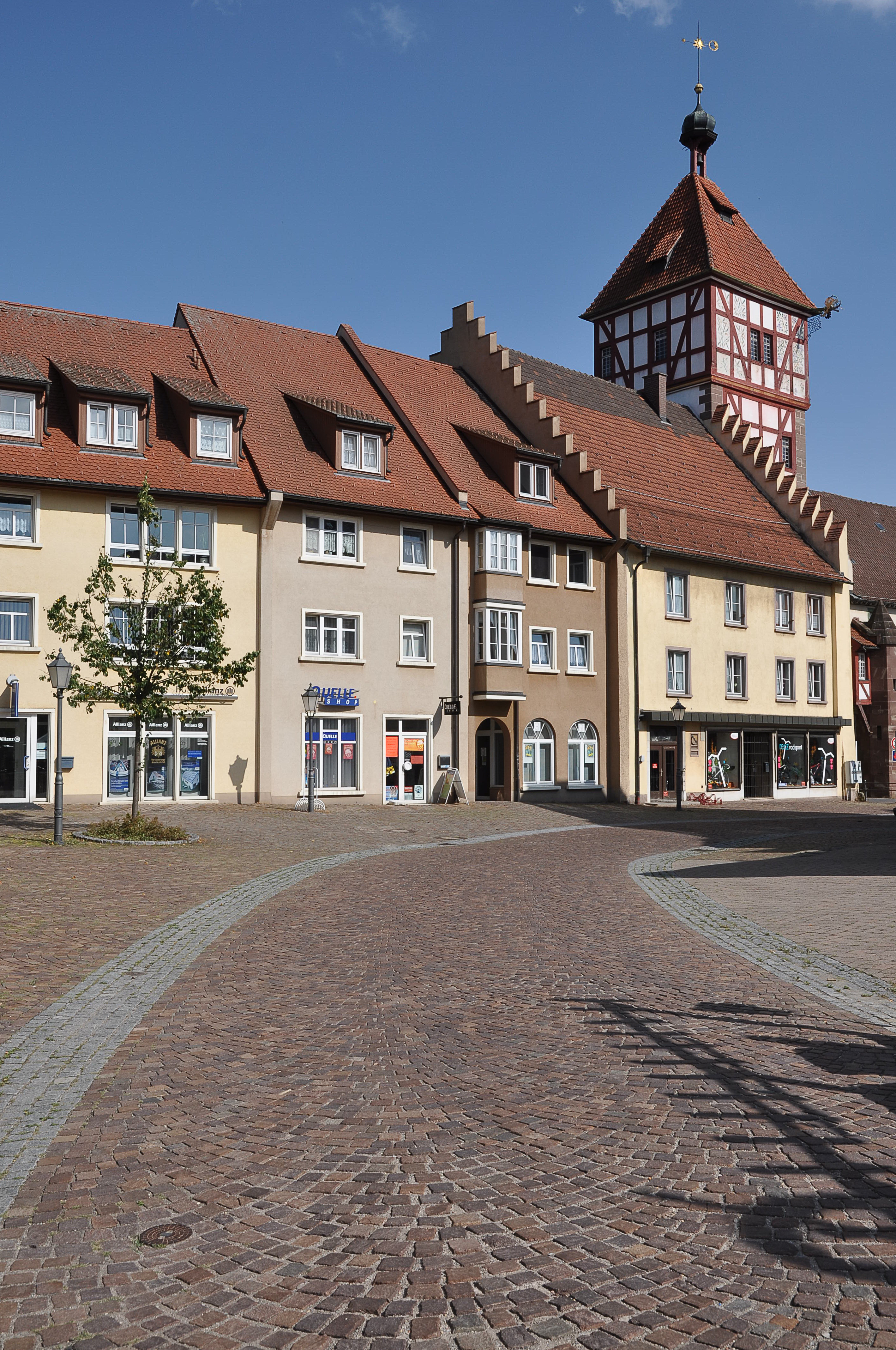 Blick auf das Mühltor, Bräunlingen